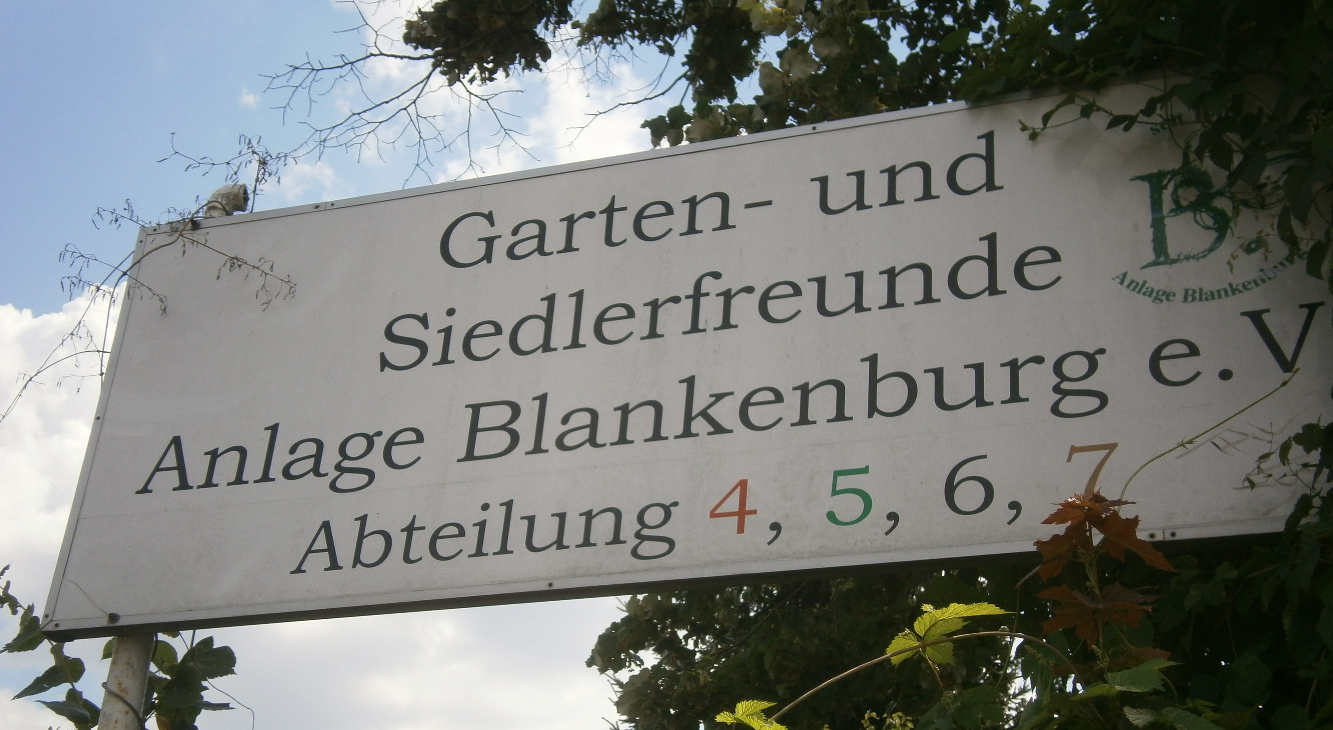 Einen großen Teil der Fläche des Ortsteils Berlin-Blankenfelde nimmt die Anlage Blankenburg ein, die nicht als Kleingartenanalage (KGA) nach Bundeskleingartengesetz organisiert ist, sondern sich als Wohnsiedlung mit 2012 benannten Privatstraßen. Hier das Schild der Anlage an der EckeRohrammerweg/ Bahnhofstraße.